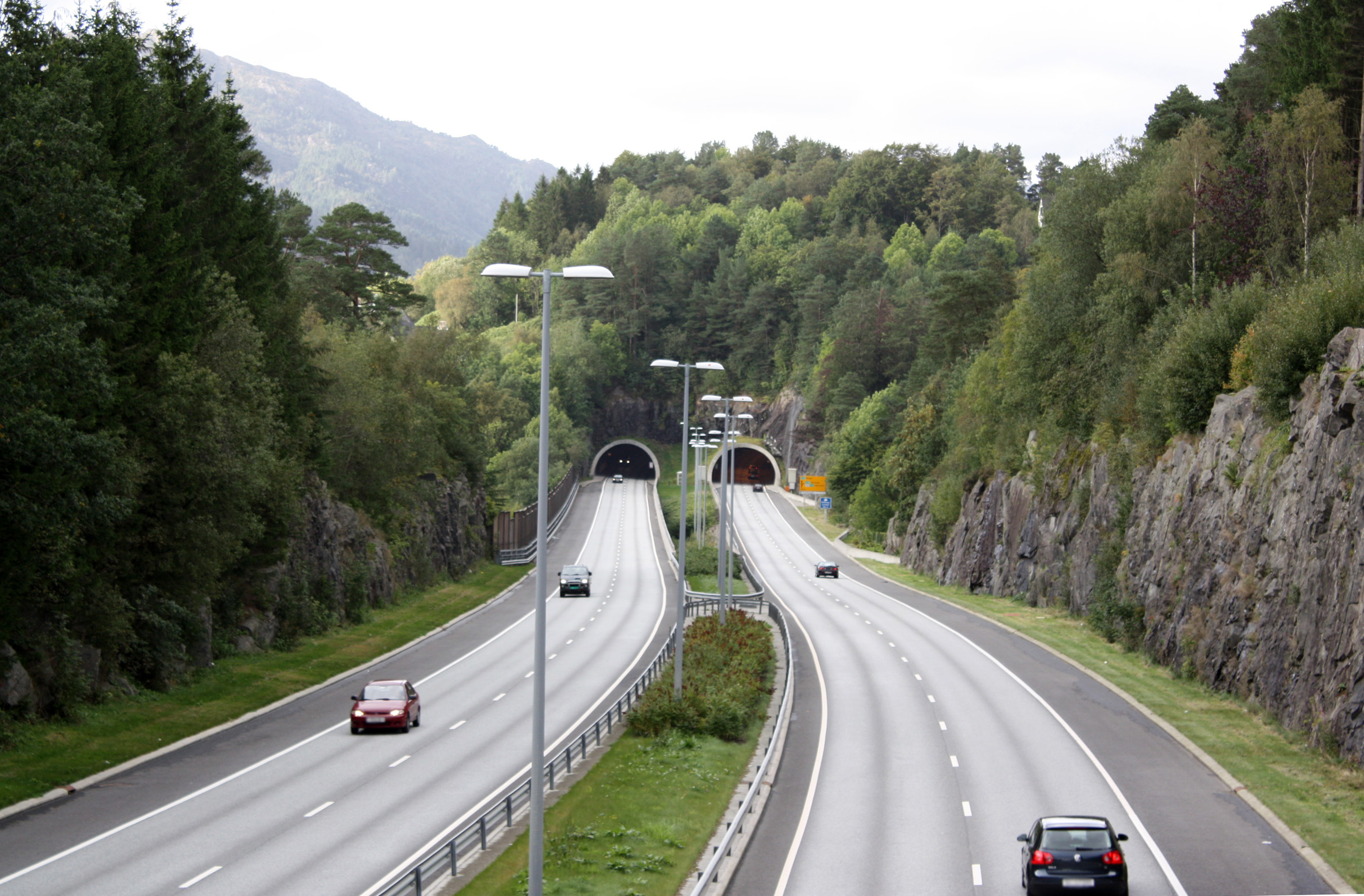 Troldhaugtunnelen, Fana, Bergen. Part of Fritz C. Riebers veg.